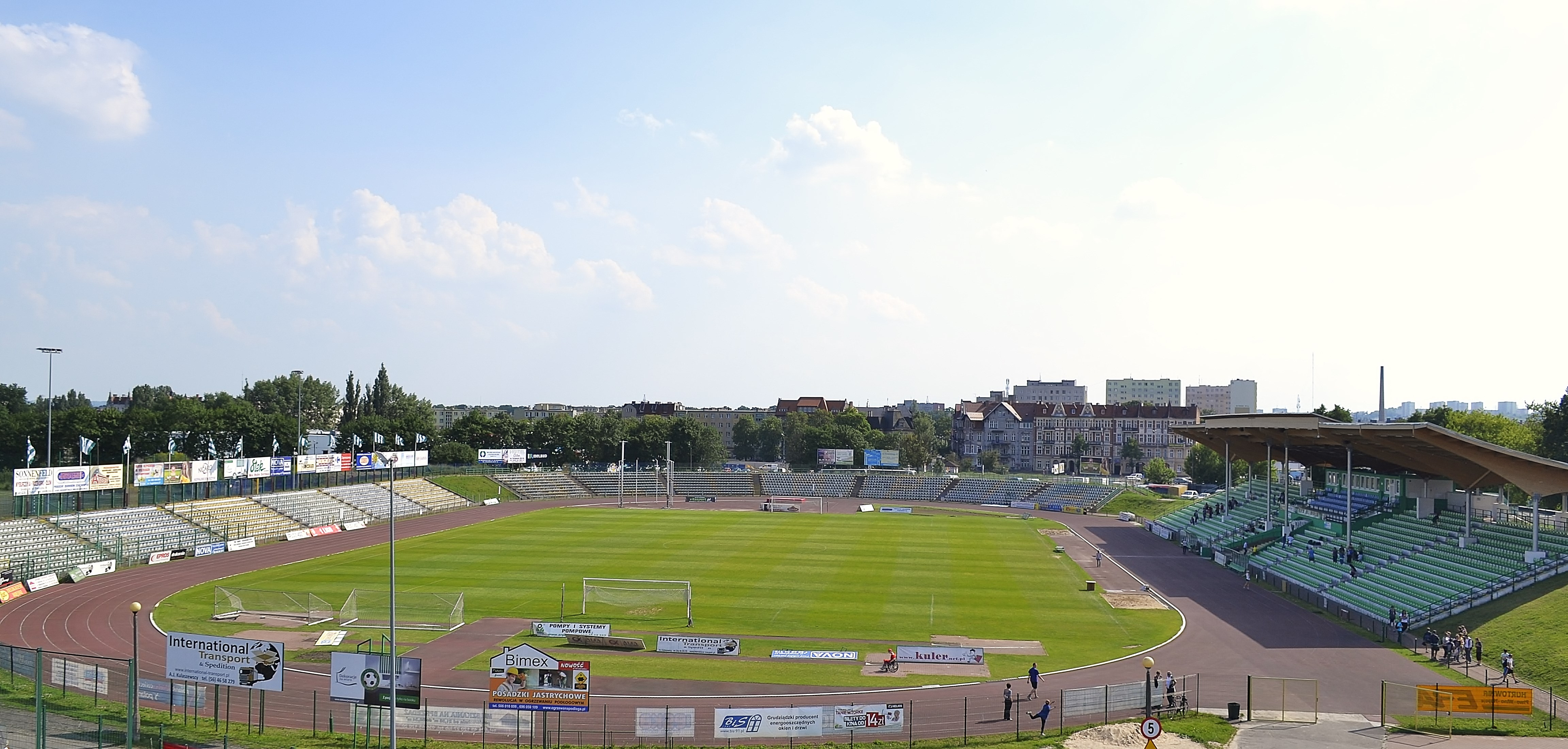 Olimpia Grudziądz